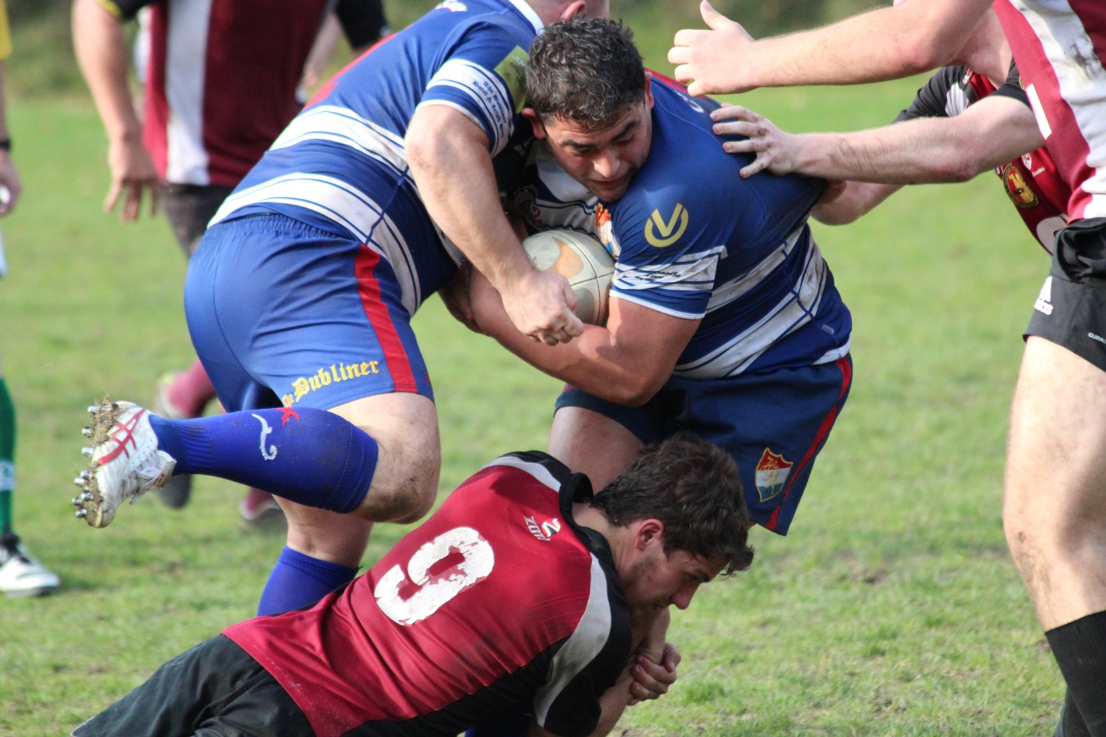 Rugby Tackling National League: Cologne vs Heidelberg (blue)